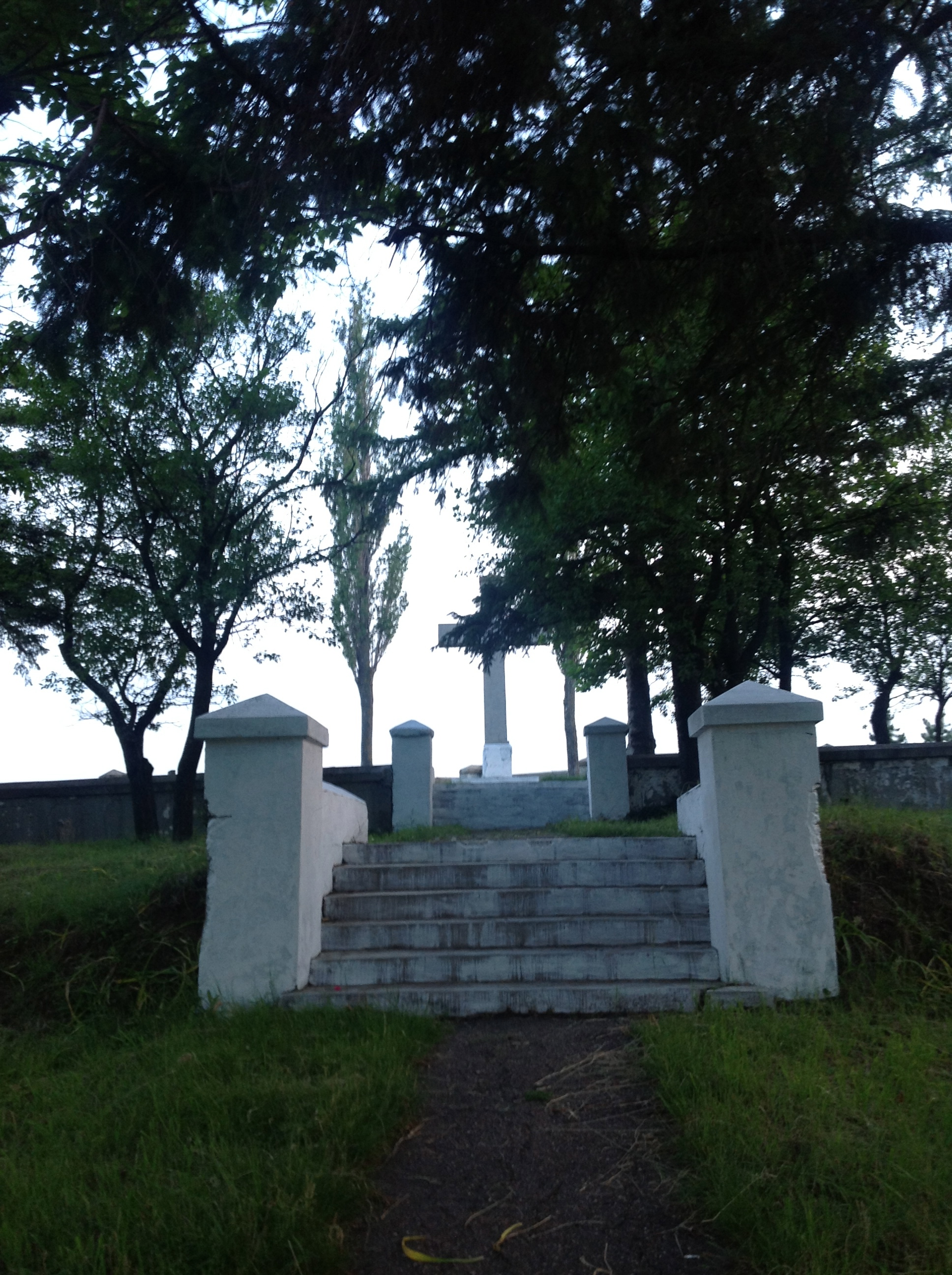 DJ Focşani-Bordeşti, 1930-1932